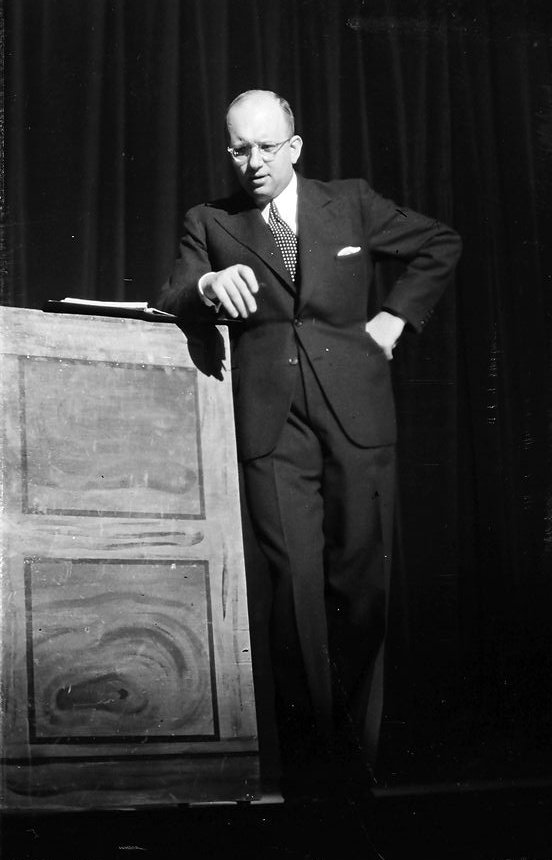 Kabarett der Komiker: Werner Finck am Katheder